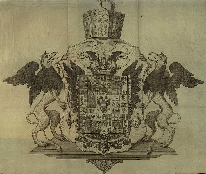 II. Ferenc osztrák császár 1804-es nagycímere